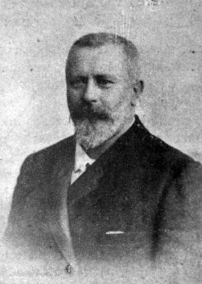 "Stanisław Olszewski: wspomnienie pośmiertne", "Tygodnik Ilustrowany" nr 34. Warszawa: 1898, s. 600.